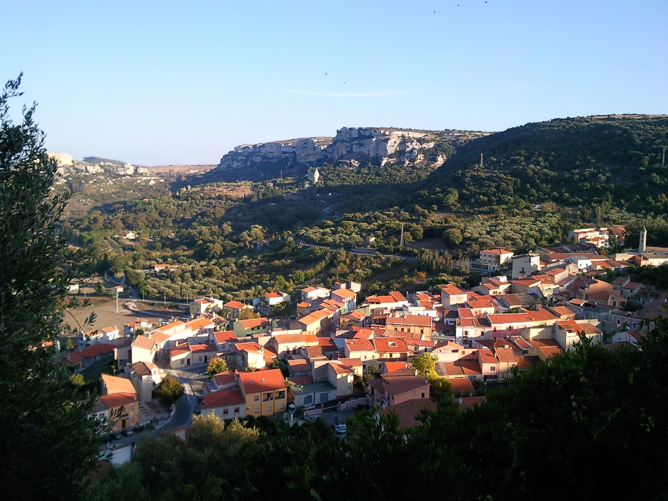 Veduta di Cargeghe in primavera